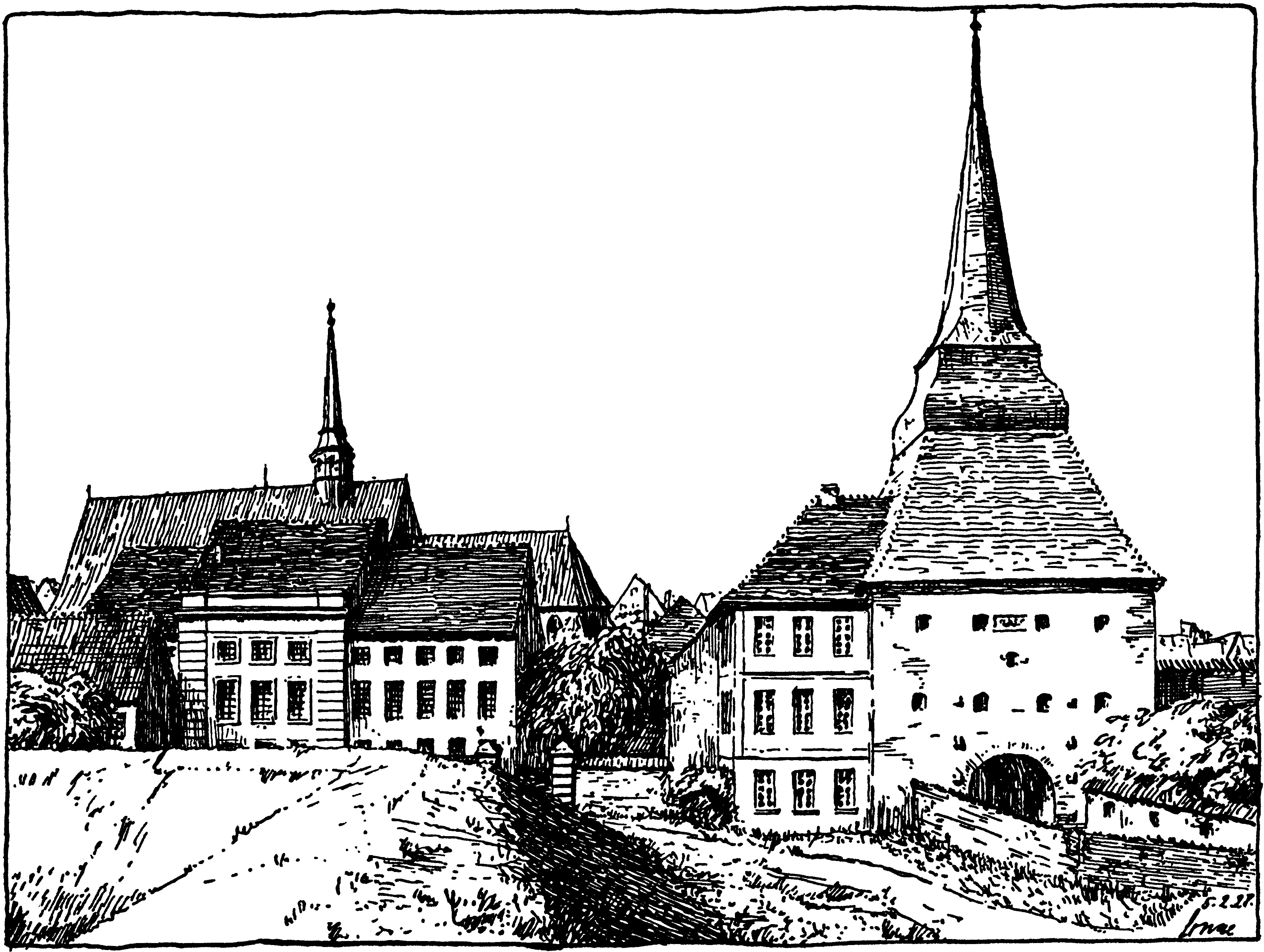 Darstellung des Steintors in der Hansestadt Rostock